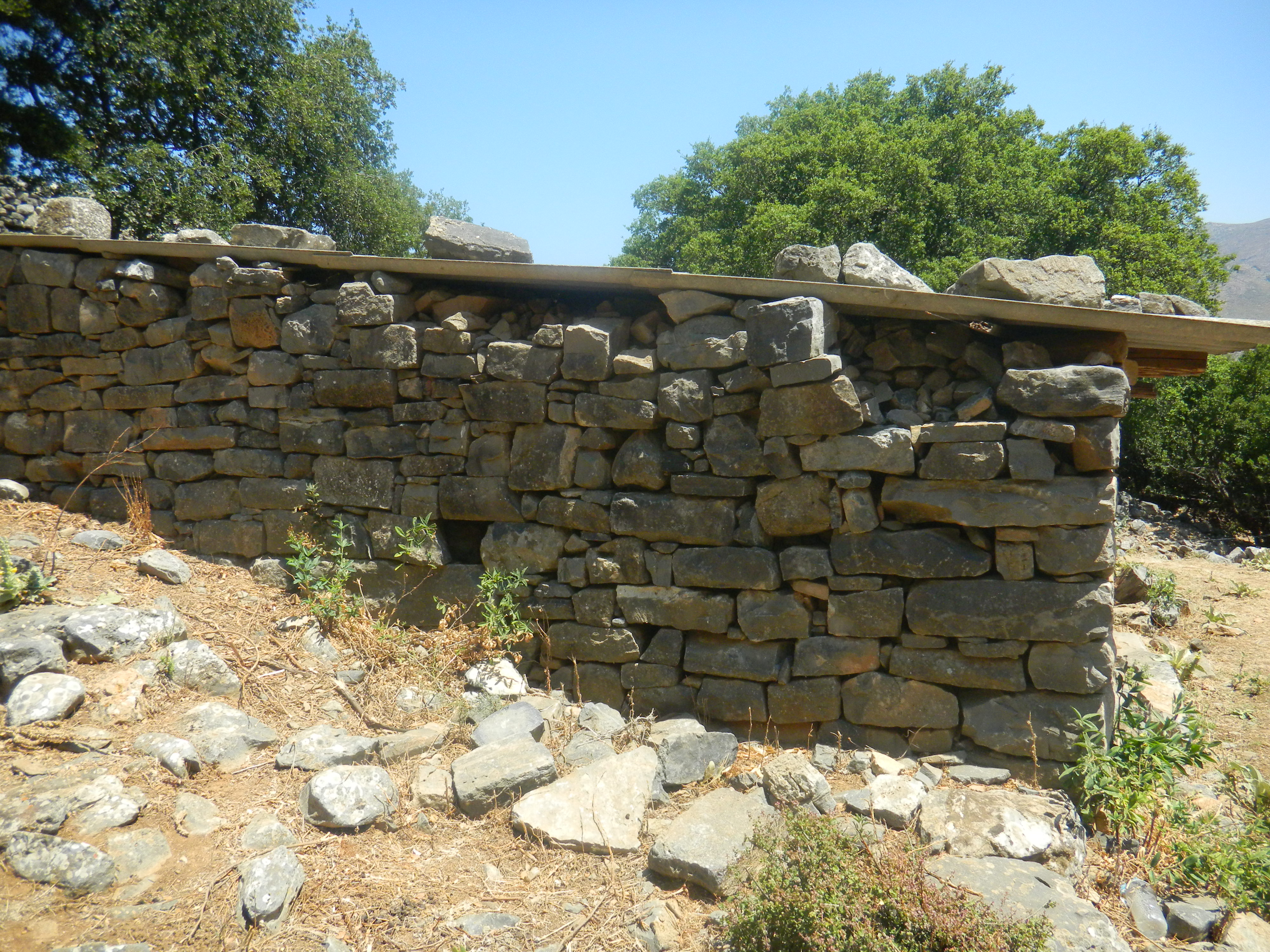 Dreros archaeological site, Crete